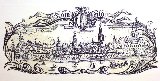 Stadtansicht von Römhild; Holzschnitt aus dem alten Römhilder Gesangbuch von 1680